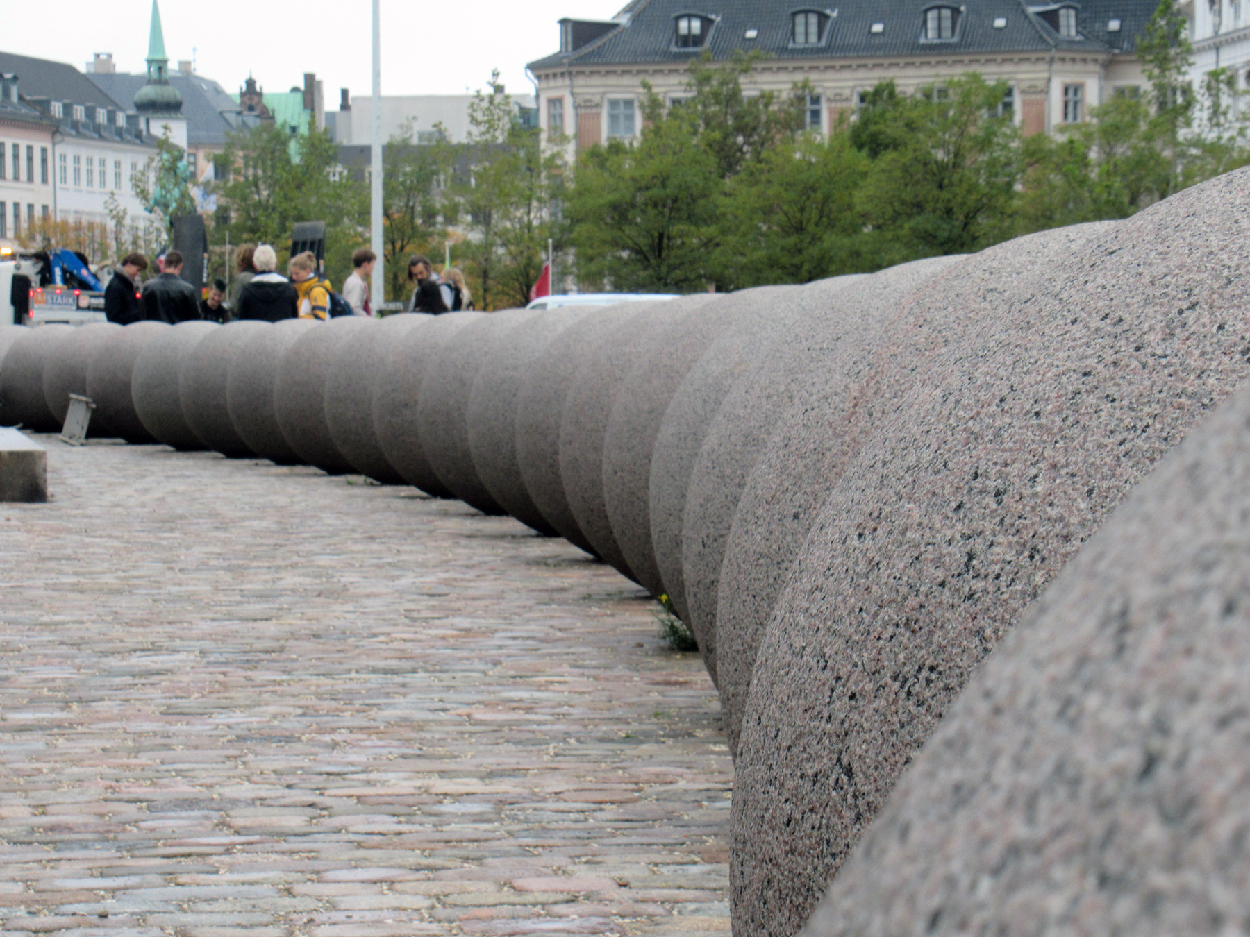 kuglerne på Christiansborg Slotsplads